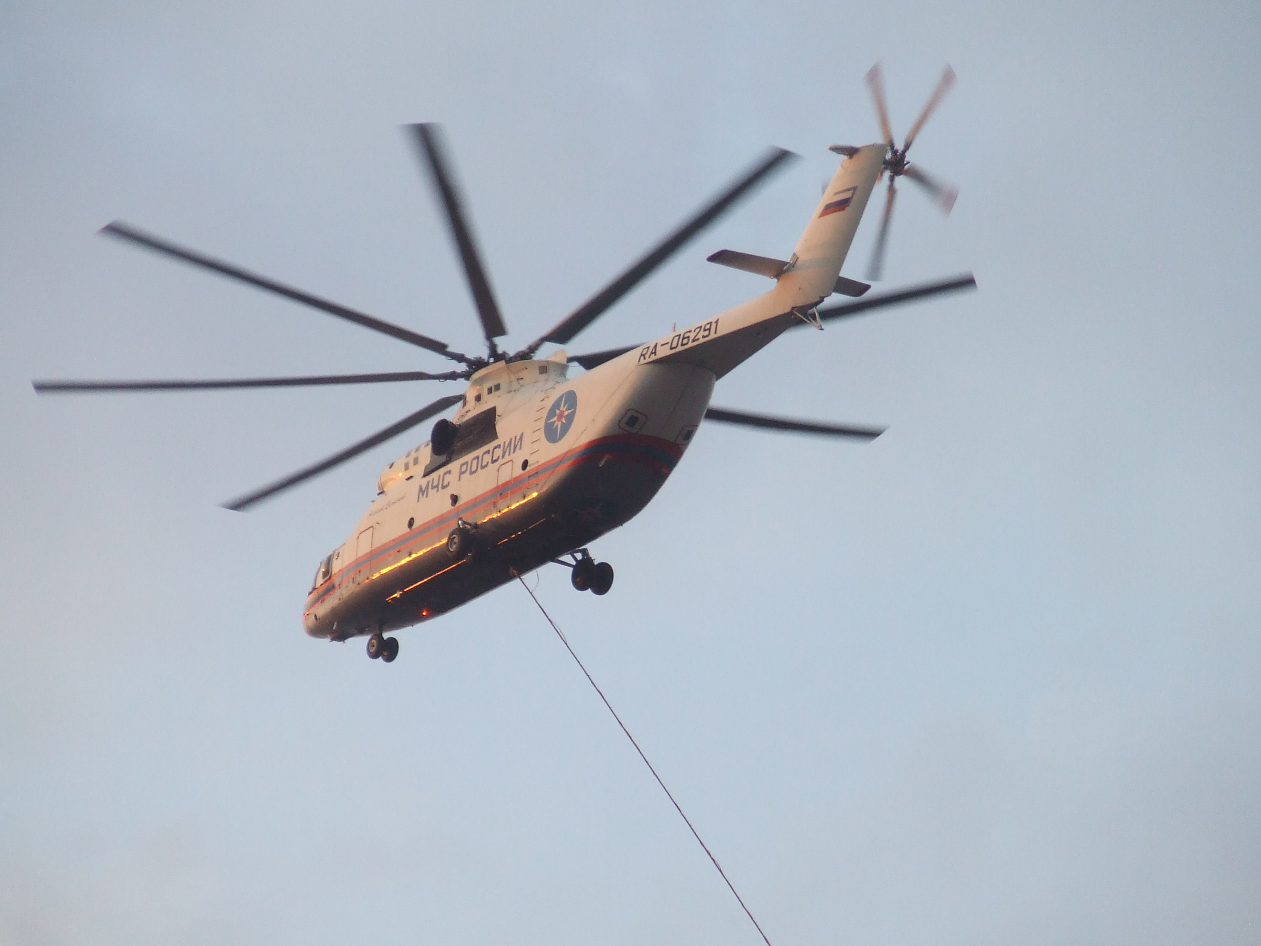 Руски хелихоптер за гашење пожара (Мил Ми 26) приликом интервенције 14. септембра 2010 на периферији Ниша. Сликао Ђ.М.